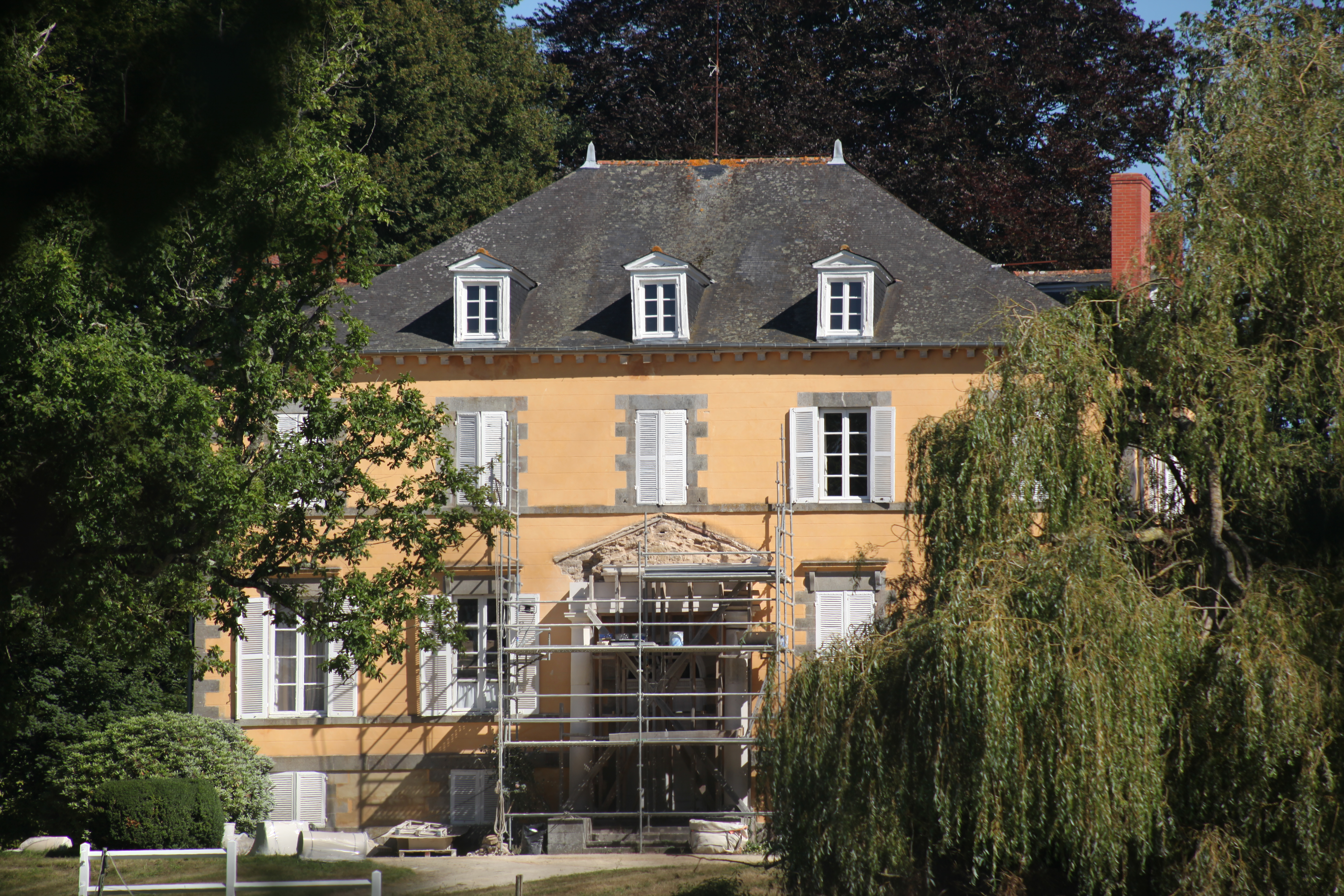 Château de Québriac, face ouest (visible de la route), en Ille-et-Vilaine (France) .